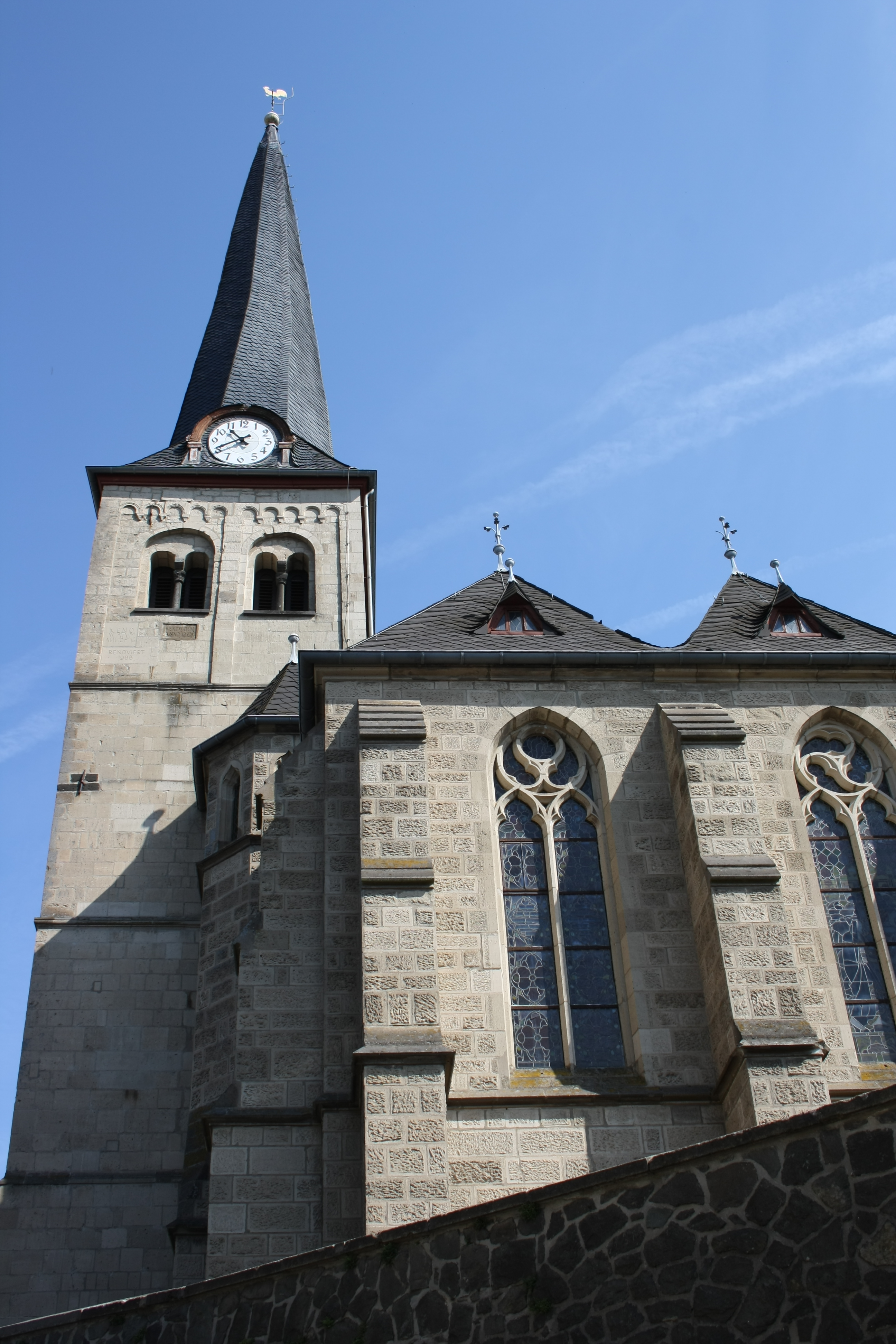 Pfarrkirche St. Philippus und Jakobus in Kempenich, Außenaufnahme mit Turm